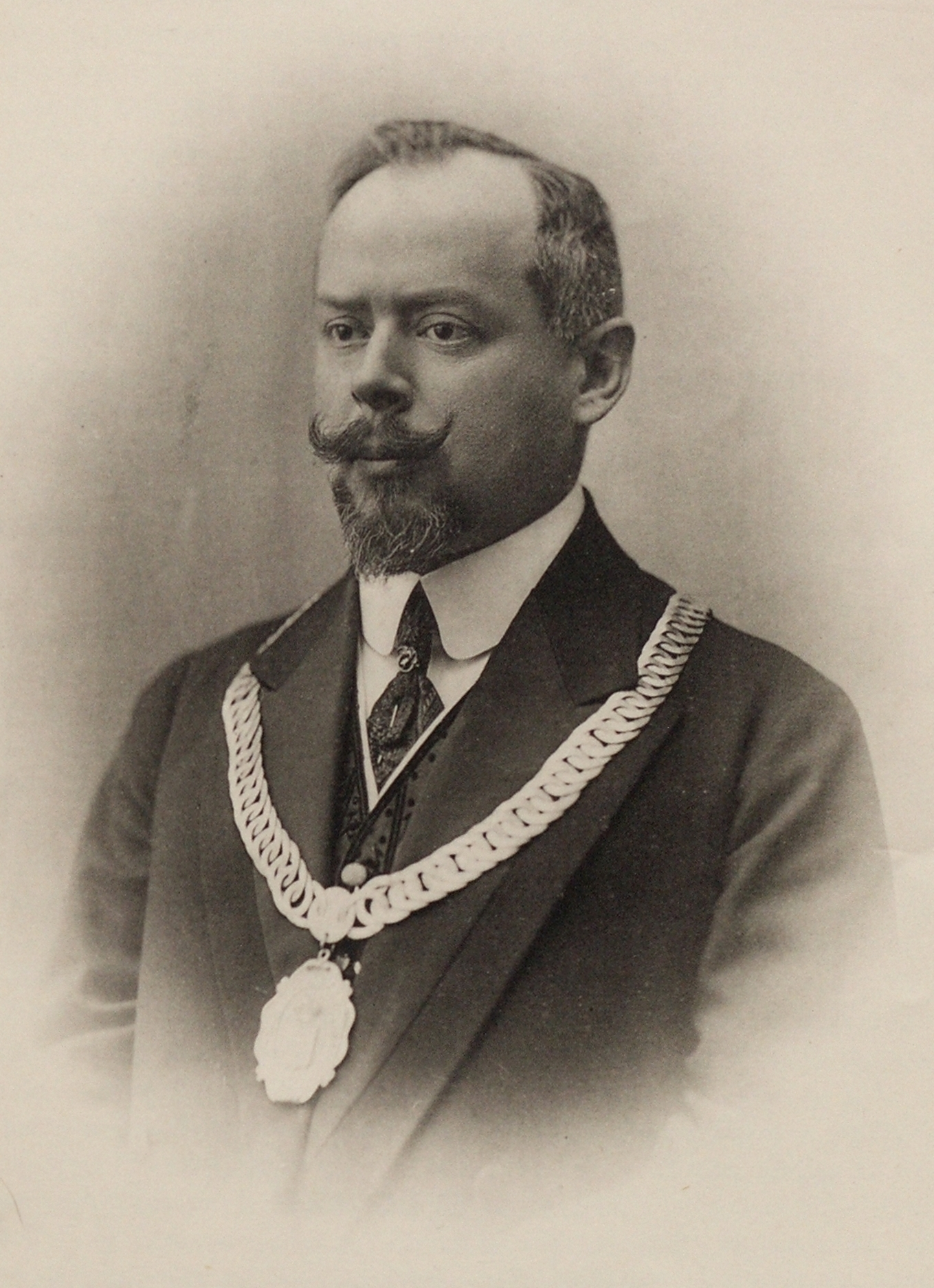 Ипполит Николаевич Дьяков, киевский городской голова в 1906—1916 годах.